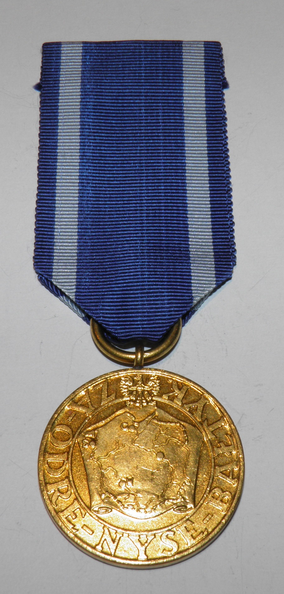 Medal za Odrę Nysę Bałtyk awers